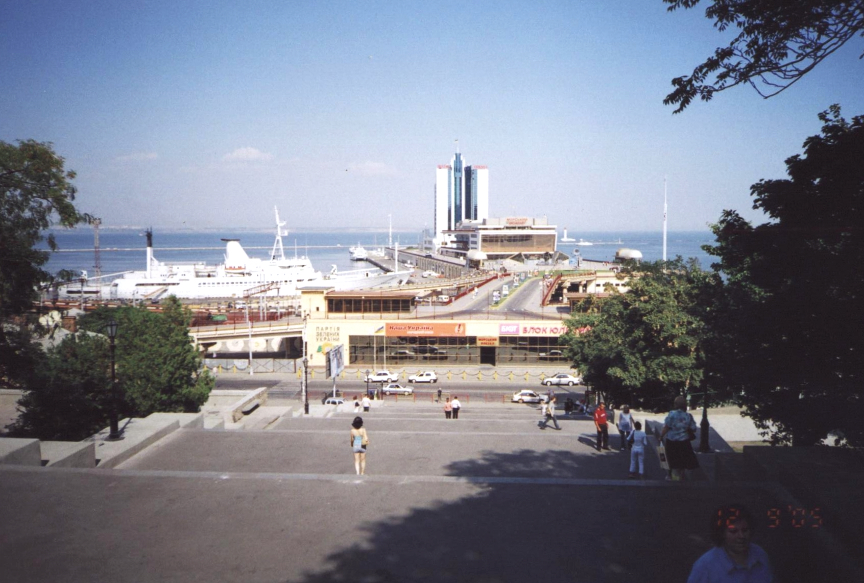 Blick von der Potemkinschen Treppe zum Hafen